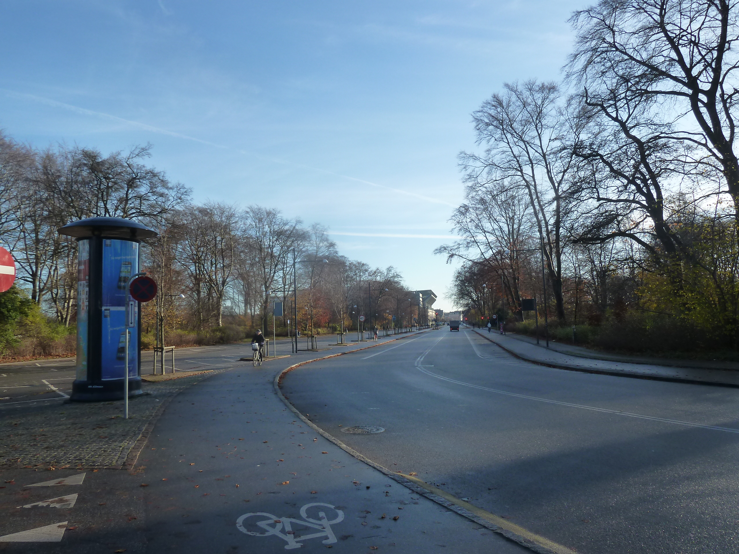 The street Øster Alle in Østerbro in Copenhagen.